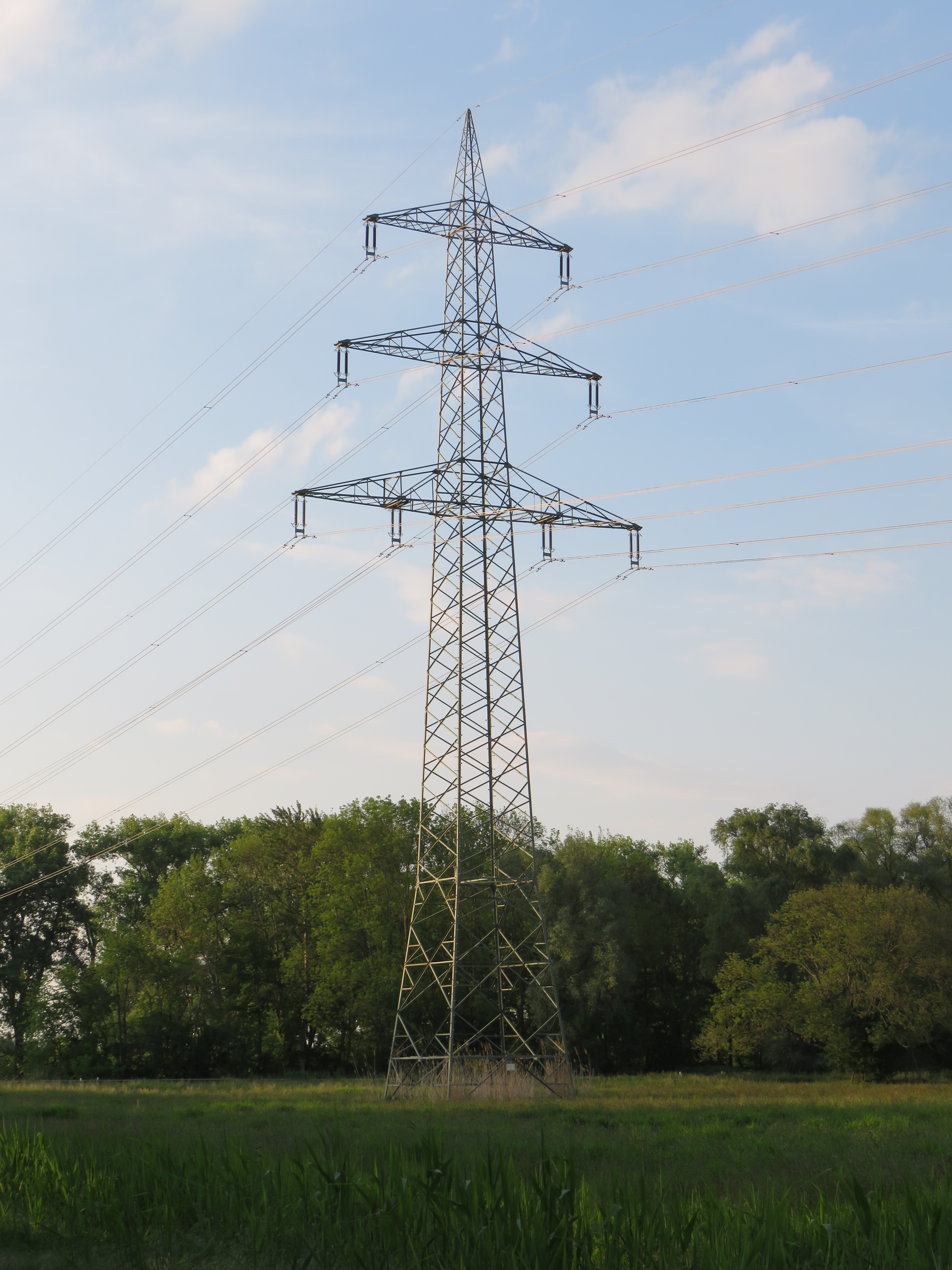 Mast 1641 der Bahnstromleitung Mannheim–Weiterstadt als Teil der Verbindung Stuttgart–Flörsheim. Die Leitung ist für vier Stromkreise ausgelegt, wird aber im Parallelbetrieb von zwei Stromkreisen belegt.